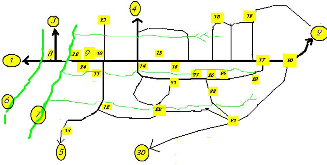 ചെങ്ങരൂർ മാപ്പ്‌. ചുരുക്കം 1,തിരുവല്ലാ റൂട്ട്‌. 2,മല്ലപ്പള്ളിറൂട്ട്‌. 3,ചക്കുമ്മൂട്‌. 4,അരീക്കൽ. 5,കടമാങ്കുളം. 6,തോട്‌. 7,പനയമ്പാല തോട്‌. 8,ശസ്താ മെഡിക്കൽ ആശുപത്രി. 9,ഓർത്തഡോക്സ്‌ പള്ളി. 10,മിൽമ. 11,വായനശാല. 12,വെട്ടിഞായത്തിൽ ക്ഷേത്രം. 13,ശാസ്താക്ഷേത്രം. 14,കത്തോലിക്കാ പള്ളി.15,സെന്റ്‌ തെരേസാസ്‌ ബെഥനി കോണ്‌വെന്റ്‌ ഗേൾസ്‌ ഹൈസ്കൂൾ.16,മാർ സെവേറിയോസ്‌ ട്രെയിനിംഗ്‌ കോളേജ്‌.17കടുവാക്കുഴി.18,ചെങ്കൽ കോളനി.19, കാഞ്ഞിരത്തുങ്കൽ. 20,മടുക്കോലി. 21,പുതുശ്ശേരി. 22,പനക്കീഴ്‌. 23,കണമൂട്ടിൽ. 24,സെന്റ്‌ ജോർജ്‌ ഇംഗ്ലീഷ്‌ മീഡിയം സ്കൂൾ. 25, പൂതാമ്പുറം സെന്റ്‌ ജോർജ്‌ എൽ പി സ്കൂൾ.26, തീപ്പെട്ടി കമ്പനി. 27,എൻ എസ്‌ എസ്‌ കരയോഗം.28,ശ്രീ ശുഭാനന്ദാശ്രമം.29,ശ്രീ കുമാരഗുരുദേവാശ്രമം.30,കല്ലൂപ്പാറ റൂട്ട്‌.31,കാണിക്കമണ്ഡപം. 32,ലക്ഷംവീട്‌ കോളനി.(പച്ച വര - തോടുകൾ. കറുപ്പു വരകൾ - റോഡുകൾ